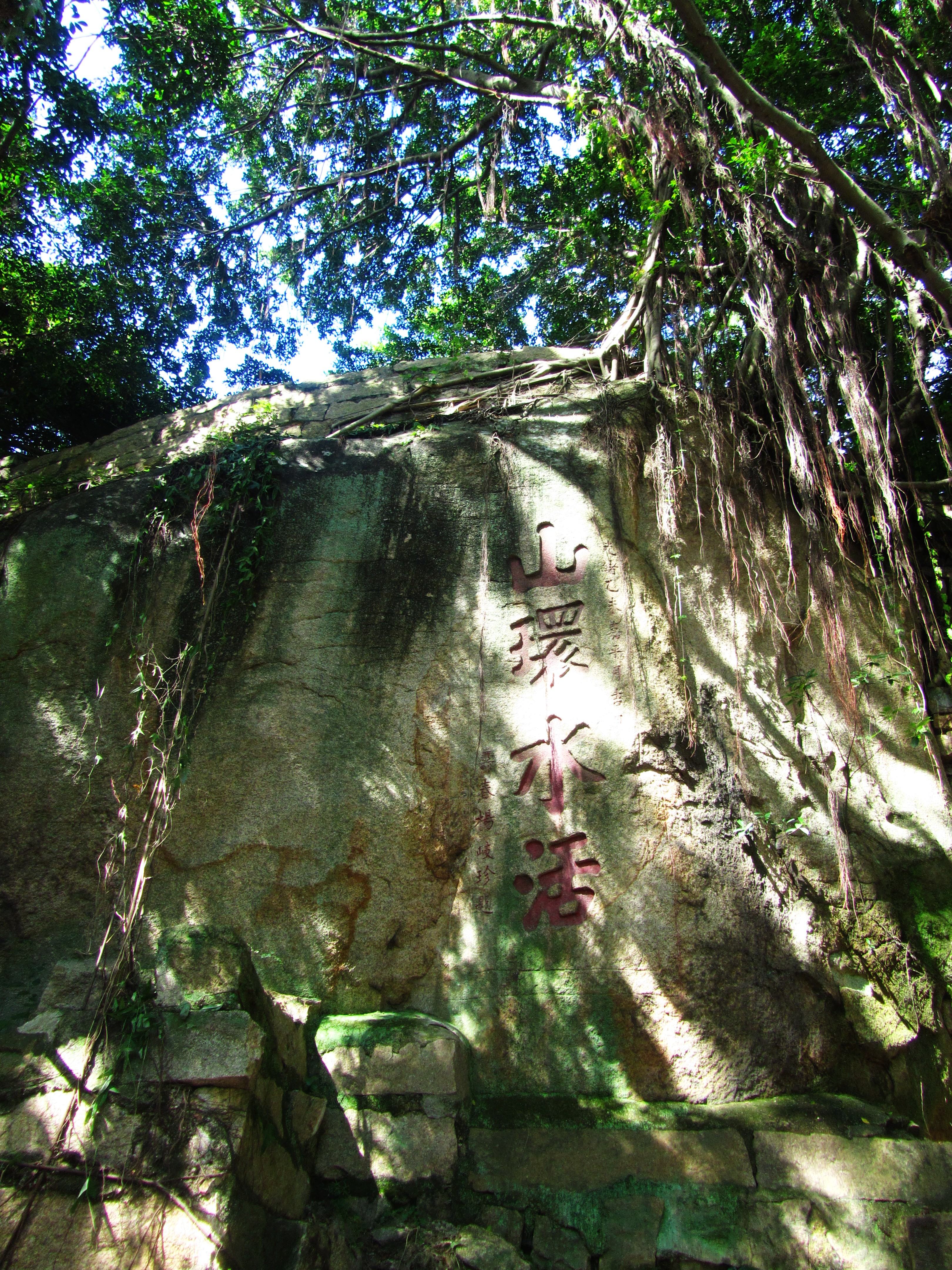 厦门所城墙，南侧城内。